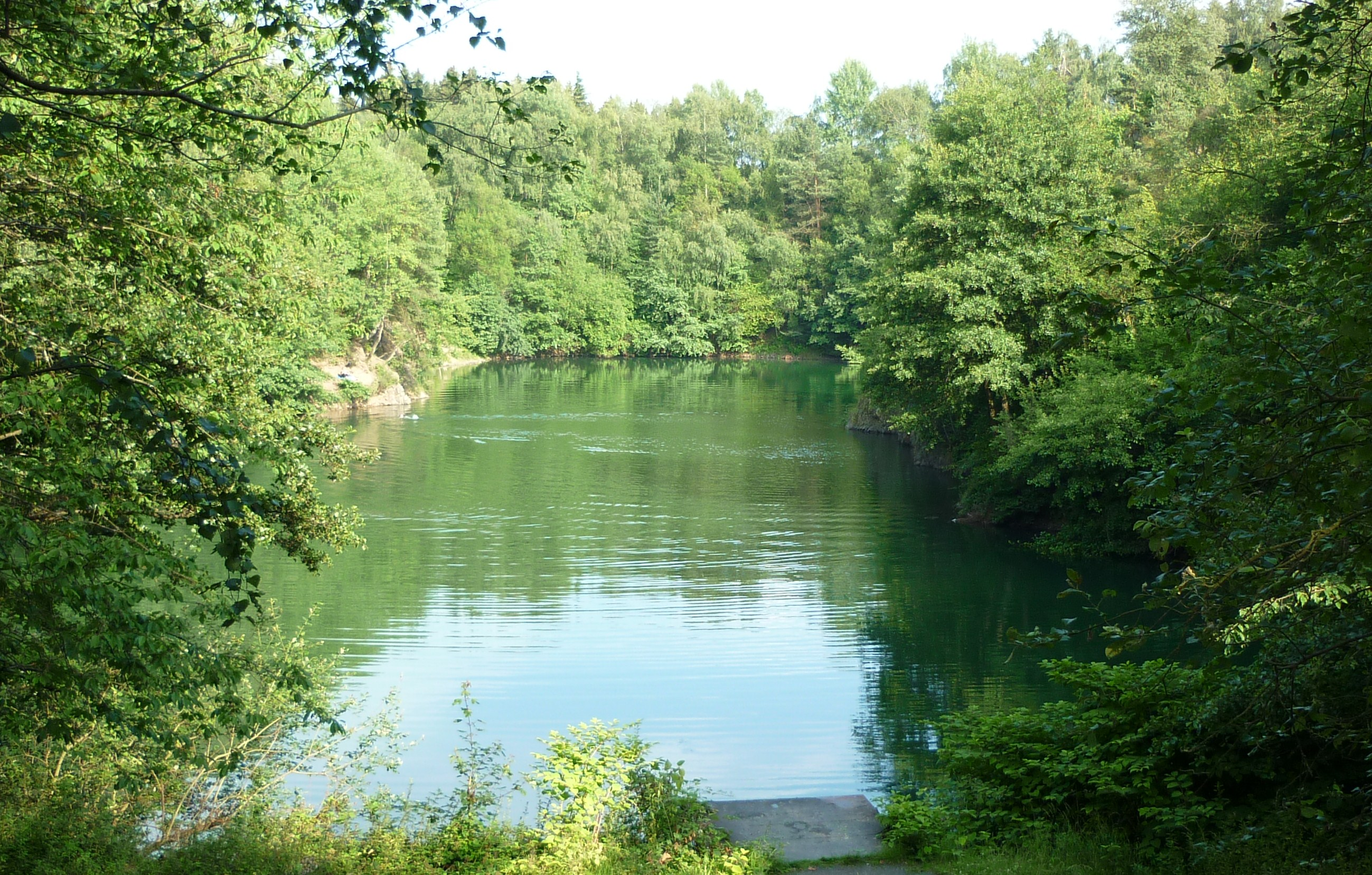 Dachsberger See, zwischen Stockhausen und Rottbitze, Aegidienberg